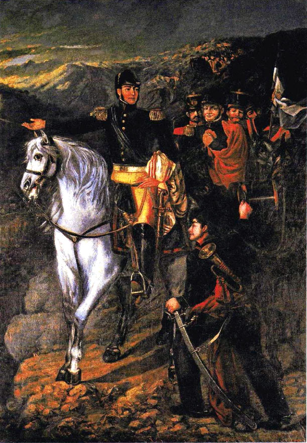 Cruce de los Andes (San Martín y O´Higgins), óleo de Martín Boneo (1865) Ley Argentina Nº 11.723 de Propiedad Intelectual Art. 5º - La propiedad intelectual corresponde a los autores durante su vida y a sus herederos o derechohabientes, durante treinta años más. En los casos de colaboración debidamente autenticada, este término comenzará a correr desde la muerte del último coautor.